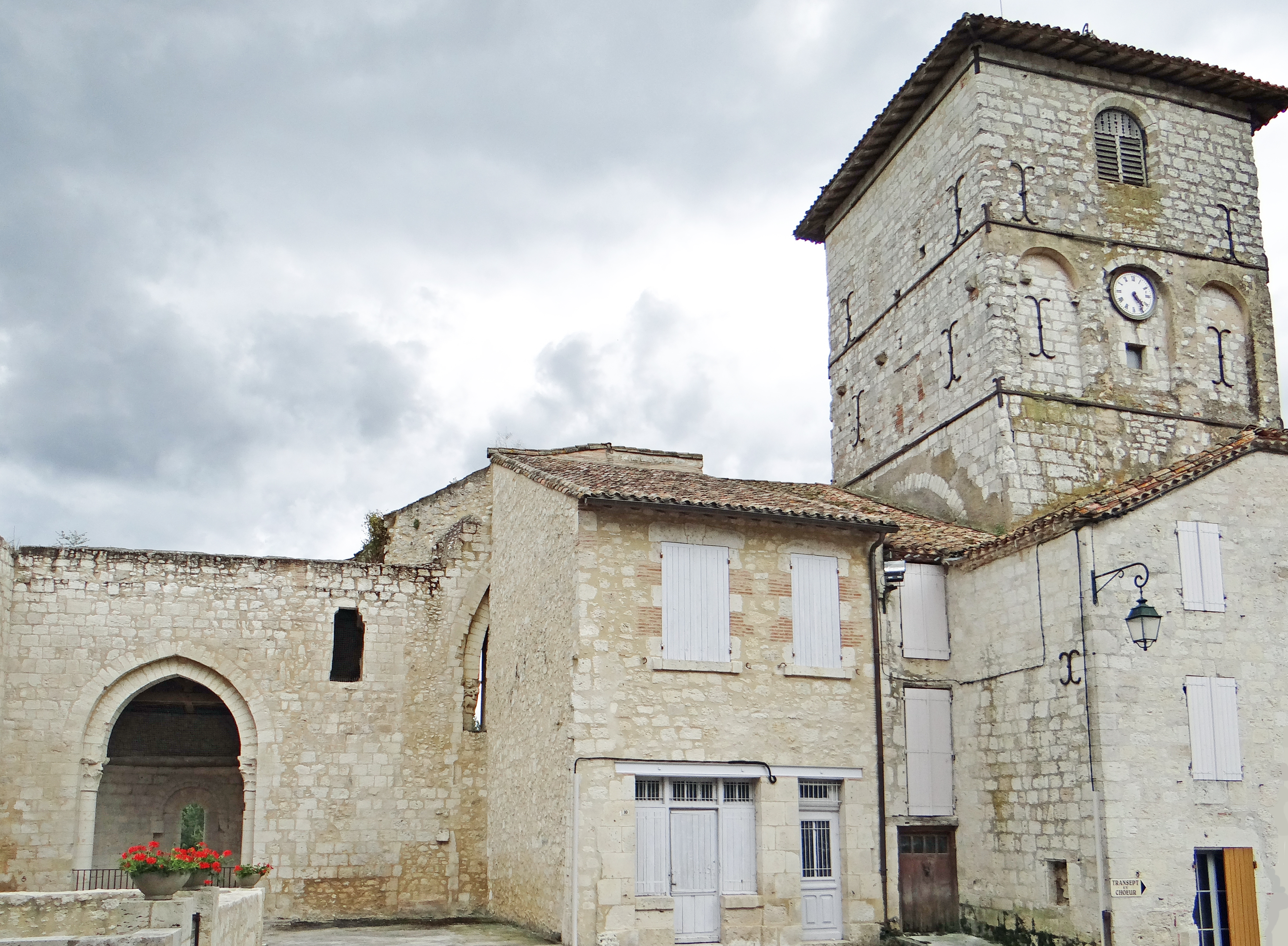 Abbaye de Saint-Maurin - De gauche à droite : absidiole du croisillon nord, l'ancienne école élémentaire devant les travées droites du choeur, une maison devant le croisillon sud et le clocher